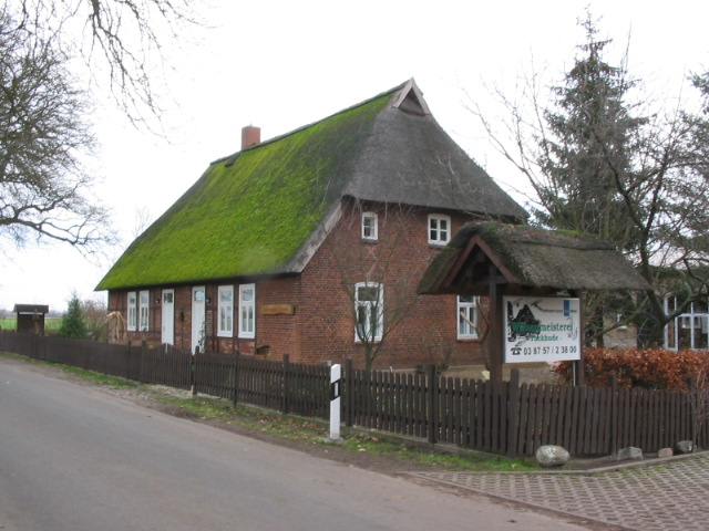 Wiesenmeisterei Tuckhude bei Neustadt-Glewe (Germany)